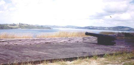 Descripción: Explanada reconstruida y cañón en el Fuerte Tauco. Autor: Roberto Bahamonde Lugar: Tauco, comuna de Chonchi, Chiloé, Chile Fecha: 25 dic. 2003